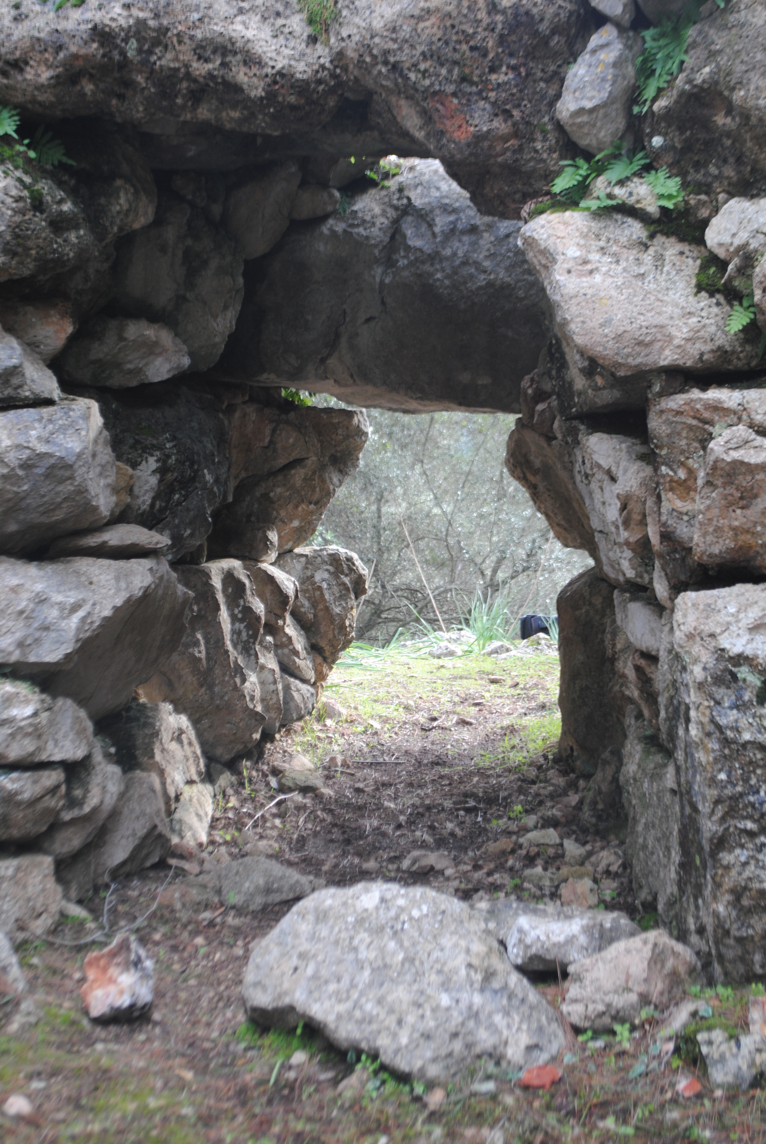 Portal d’accés amb el llindar ciclopi.